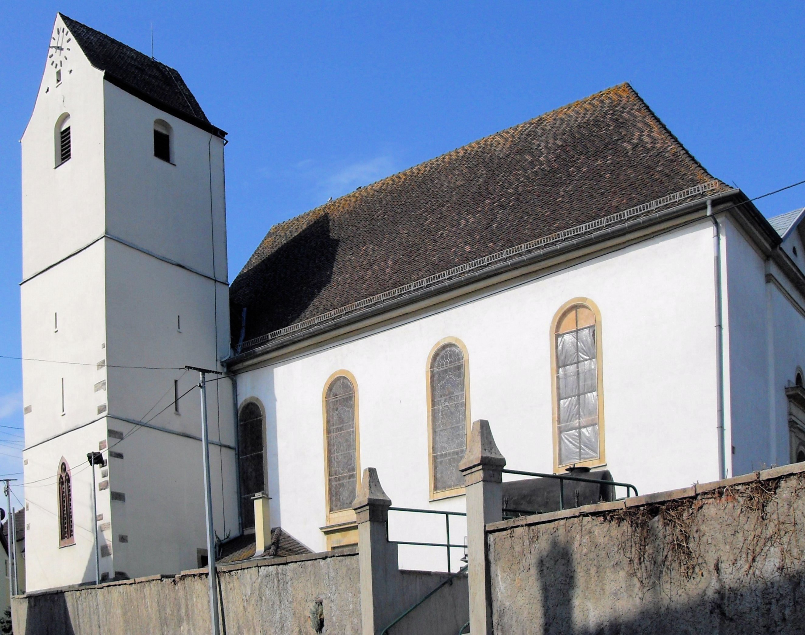 L'èglise Saint-Michel d'Uffheim